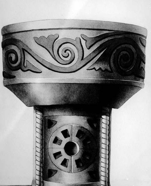 Imatge